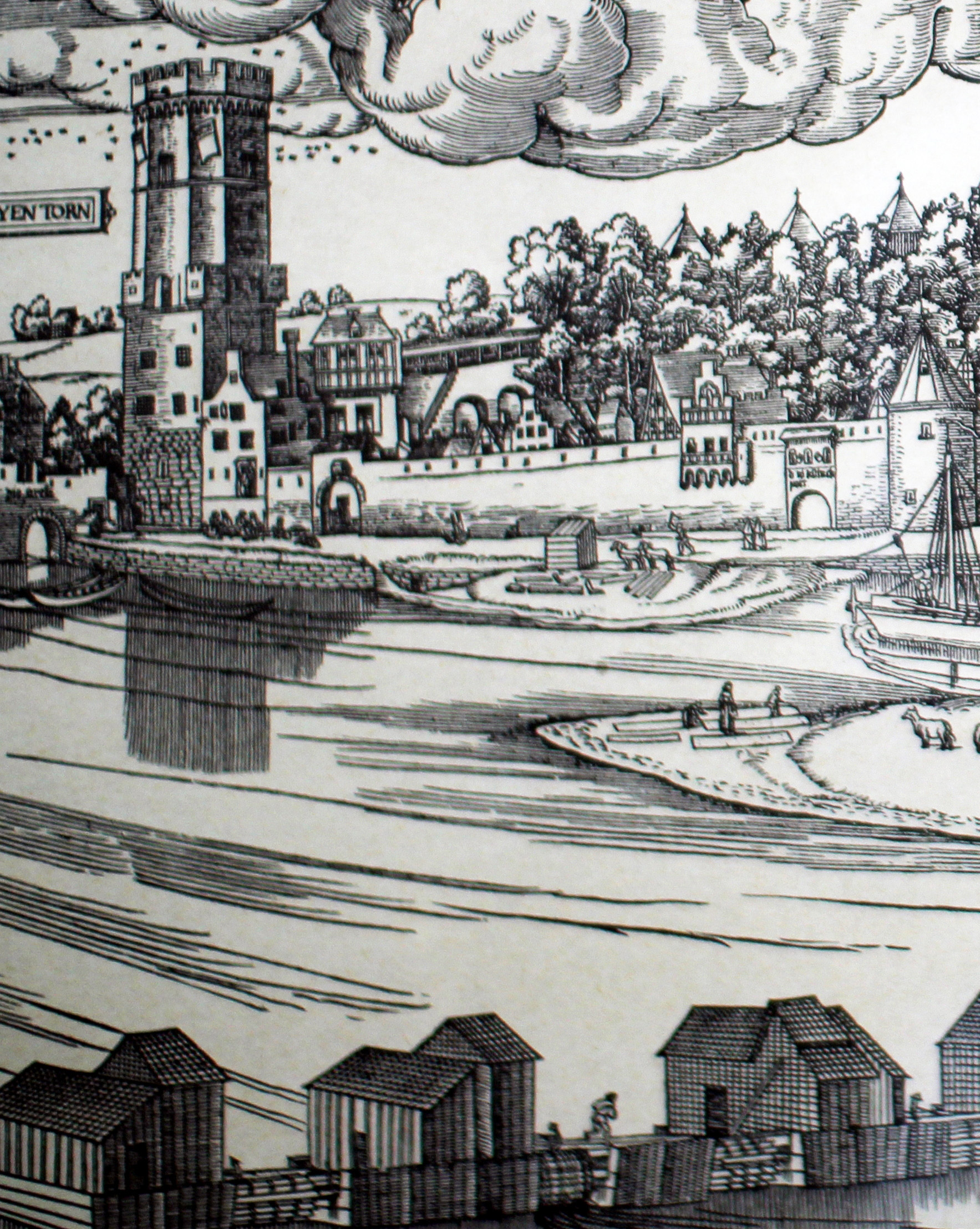 Kölner Stadtbefestigung. Bayenturm bis Dreikönigenpforte nach Anton Woensams Holzschnitt von 1531